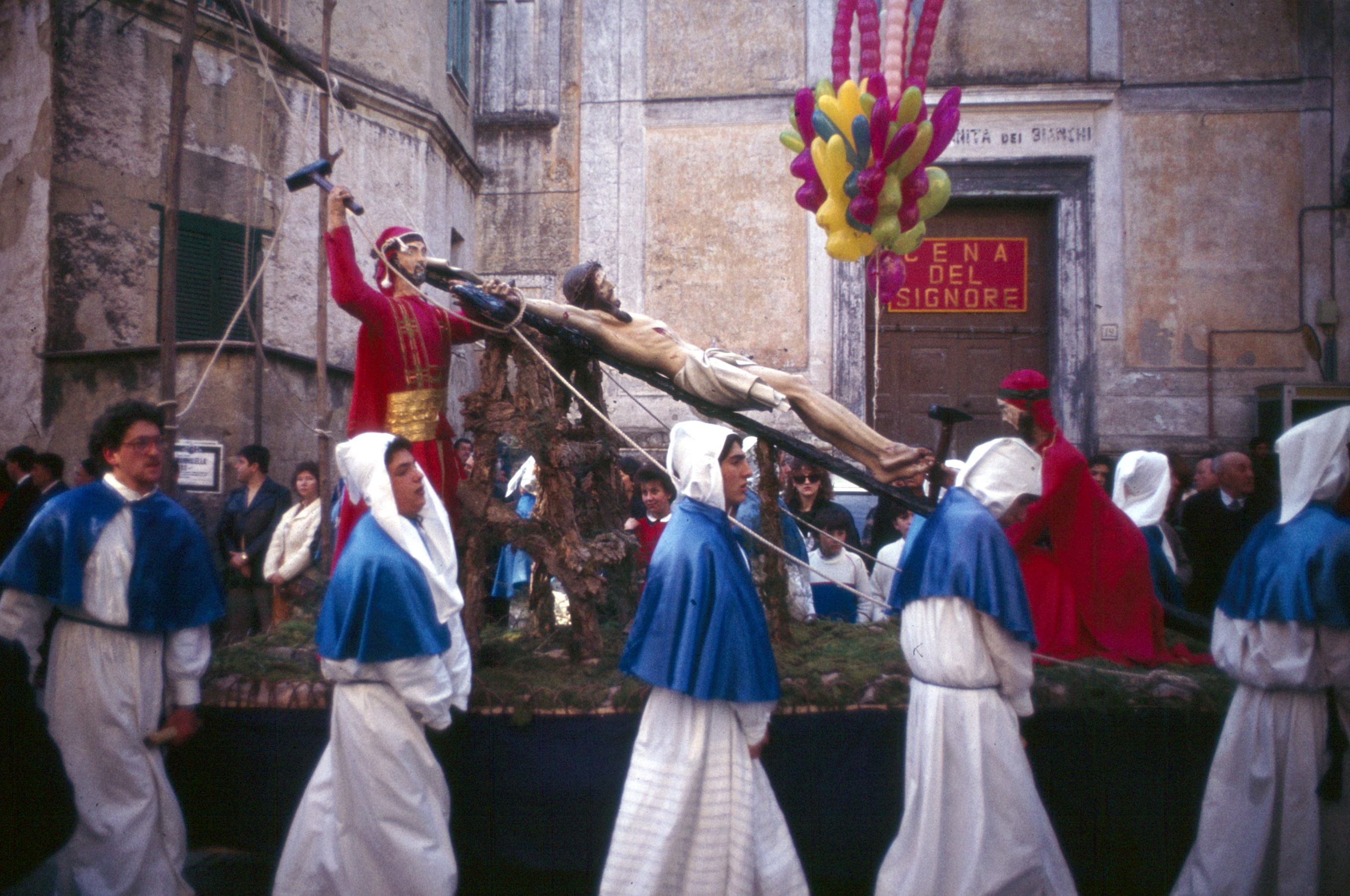 Karfreitagsprozession auf Procida